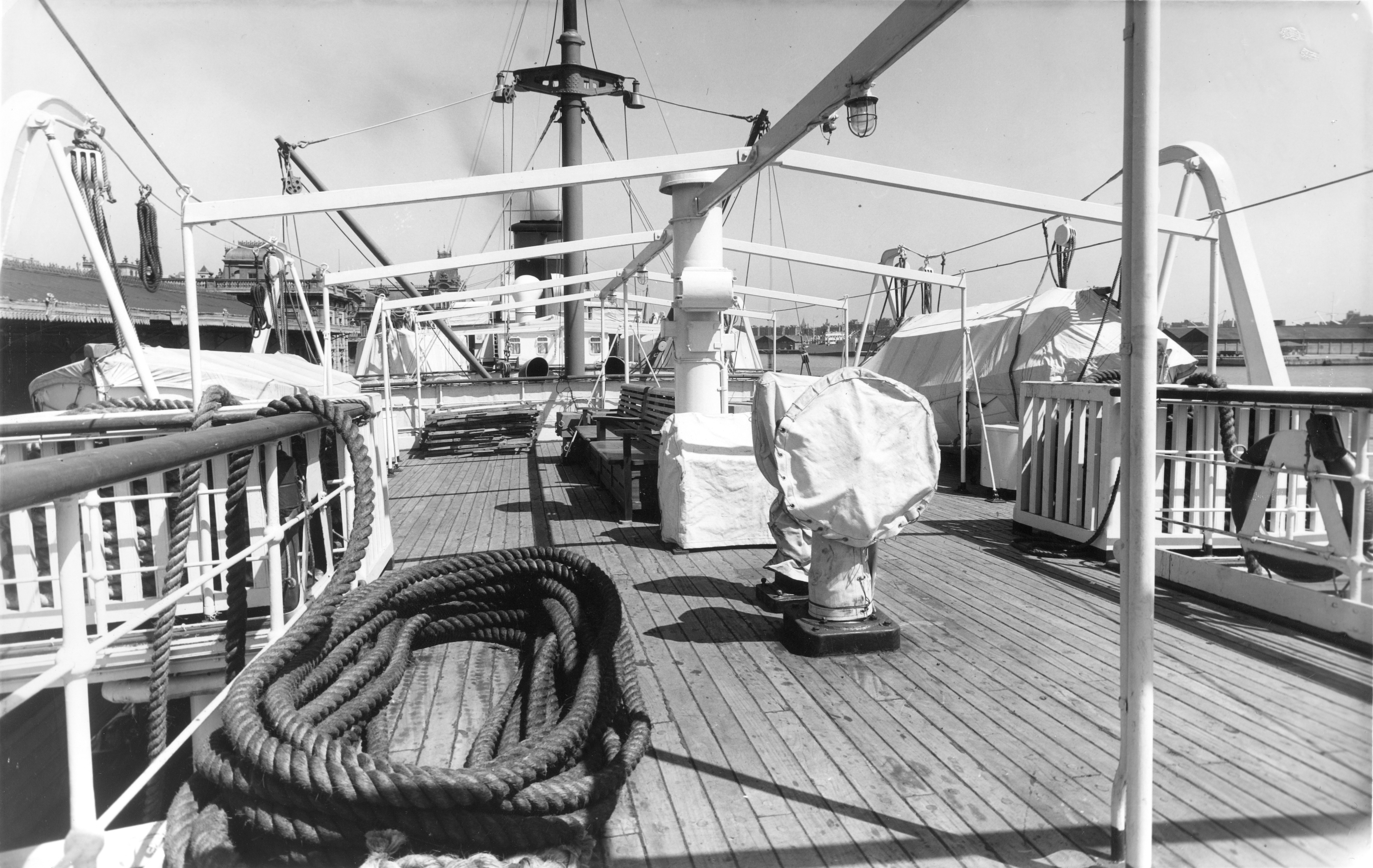 Detalle buque Trasmediterránea en el Puerto de Barcelona